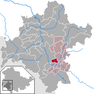 Ellingshausen in Thuringia - District Schmalkalden-Meiningen